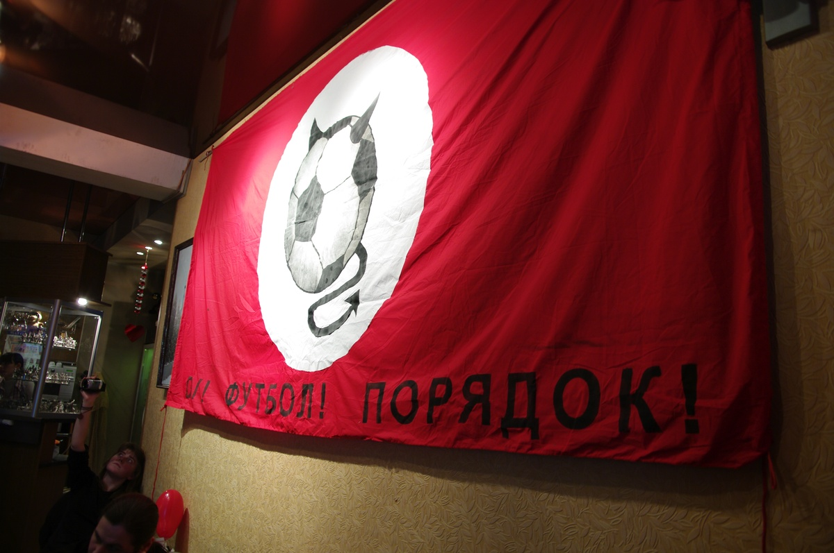 флаг Забей